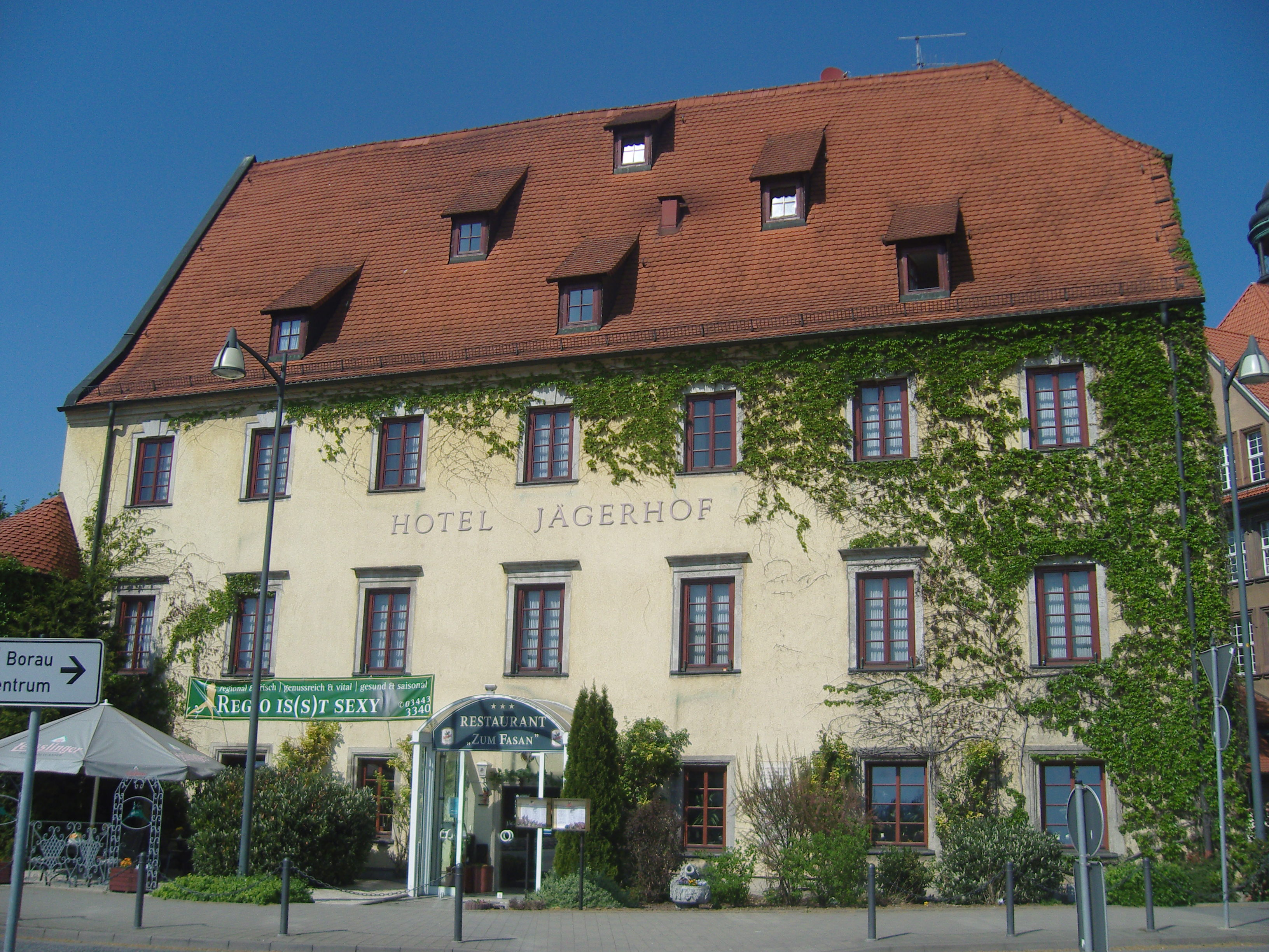 Hotel "Jägerhof" in Weißenfels, Nikolaistraße 51, Ort der Uraufführung von Johann Sebastians "Jagdkantate"; Wohnhaus von David Elias Heidenreich und von Wilhelm Harnisch